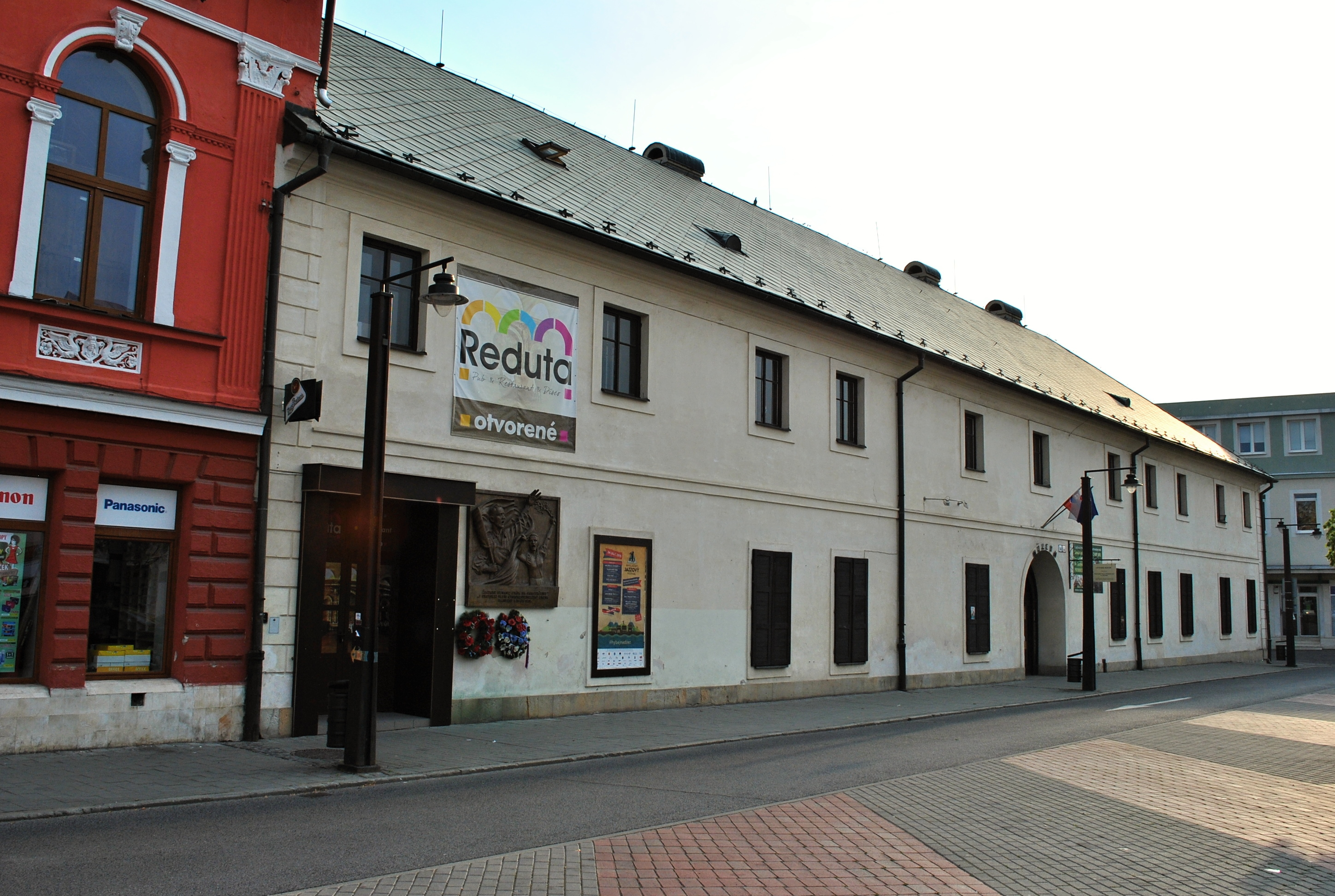 Liptovský Mikuláš - budova tzv. Čierneho orla - 2015